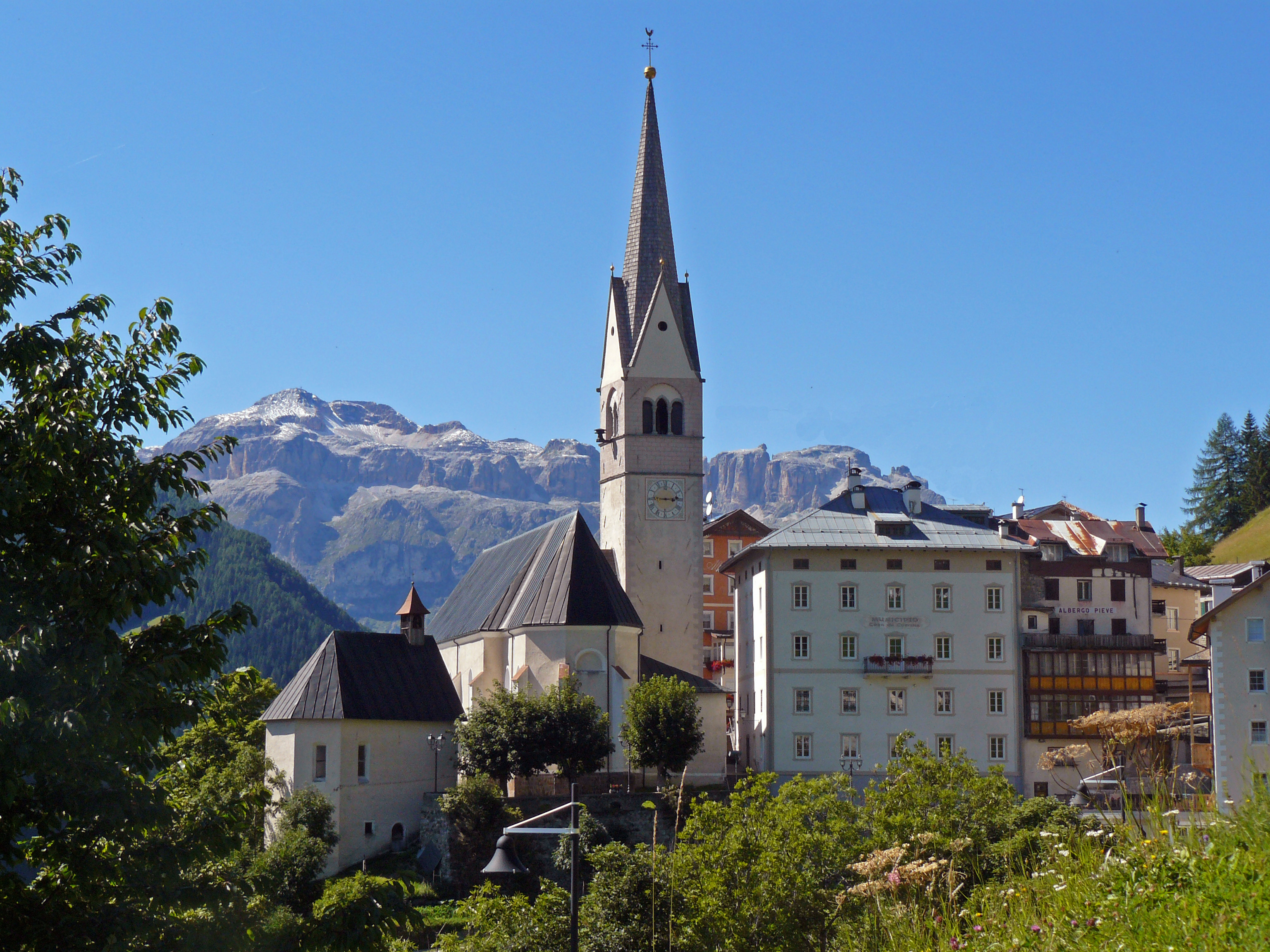 The church in Pieve di Livinallongo (Livinallongo del Col di Lana)